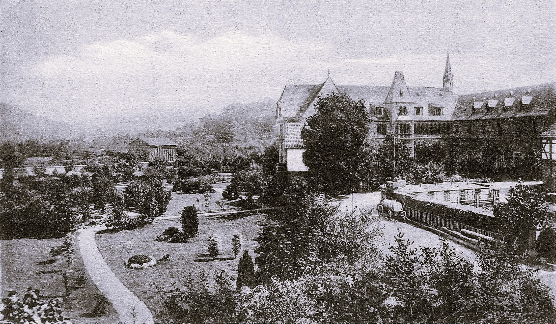 Deutsche Kolonialschule Wihelmshof, Witzenhausen an der Werra, Deutschland.